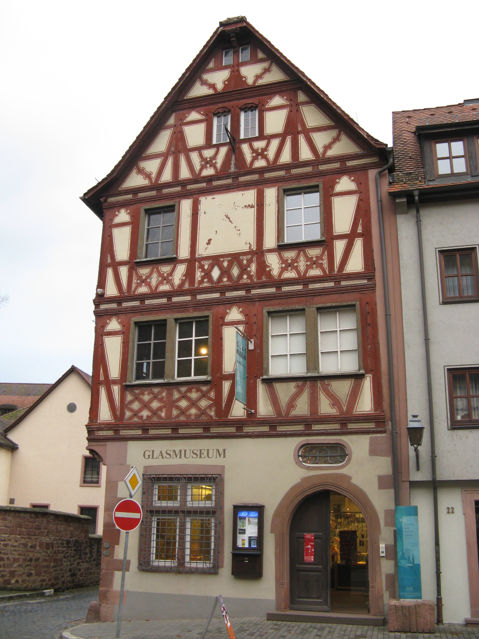 Wertheim Glass Museum, building (dated 1577)